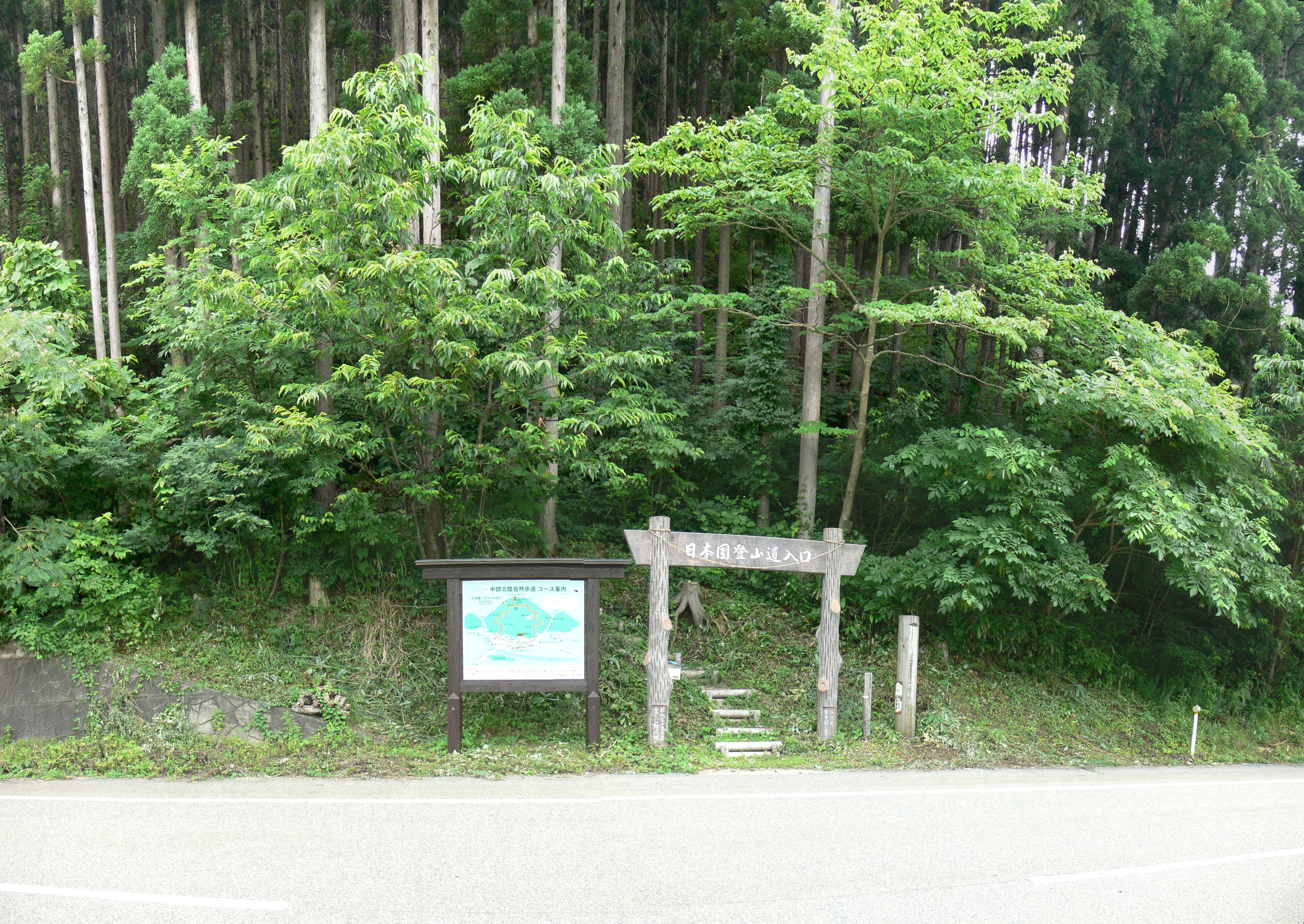 日本国登山道